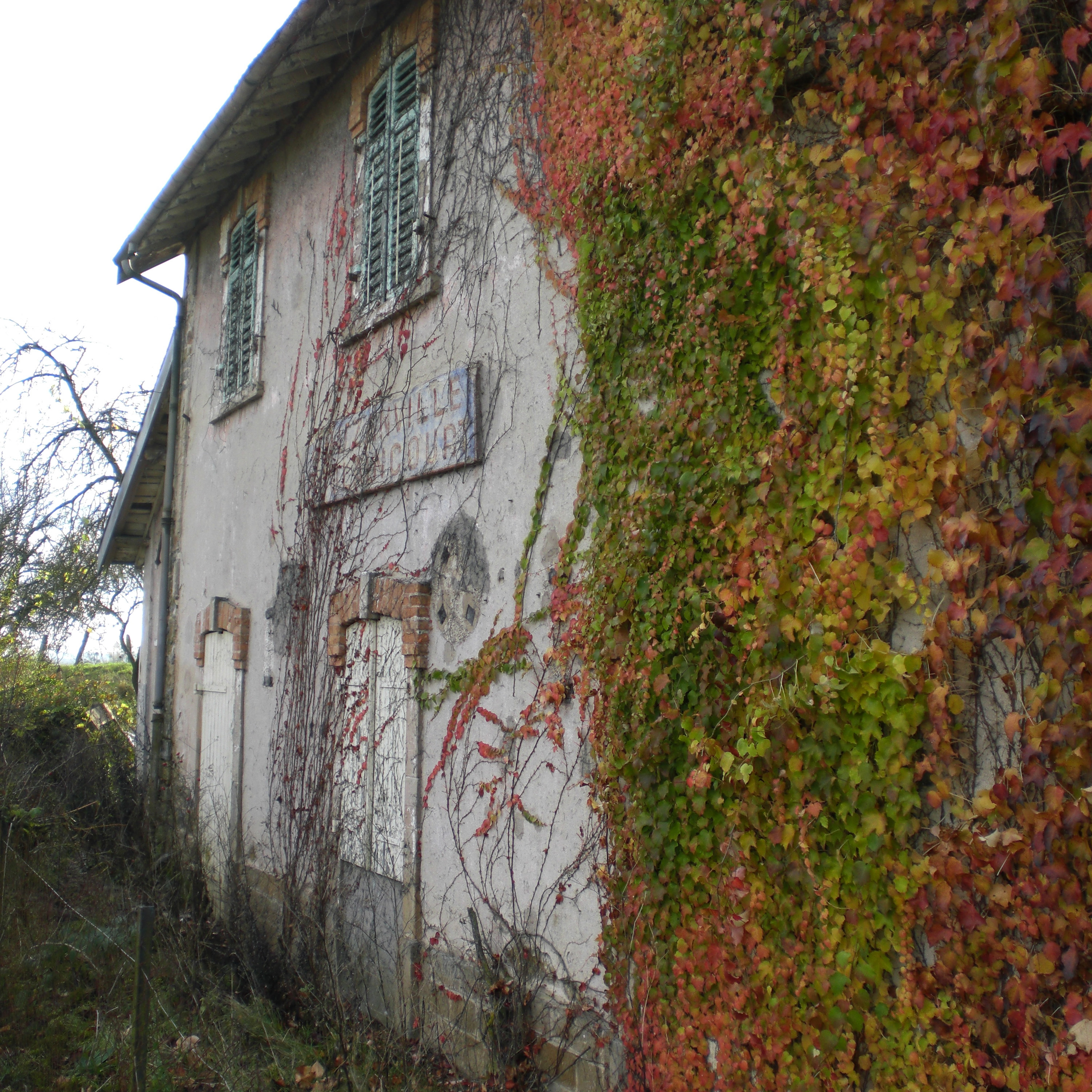 Bahnhof Bouzanville-Boulaincourt, Gleisseite